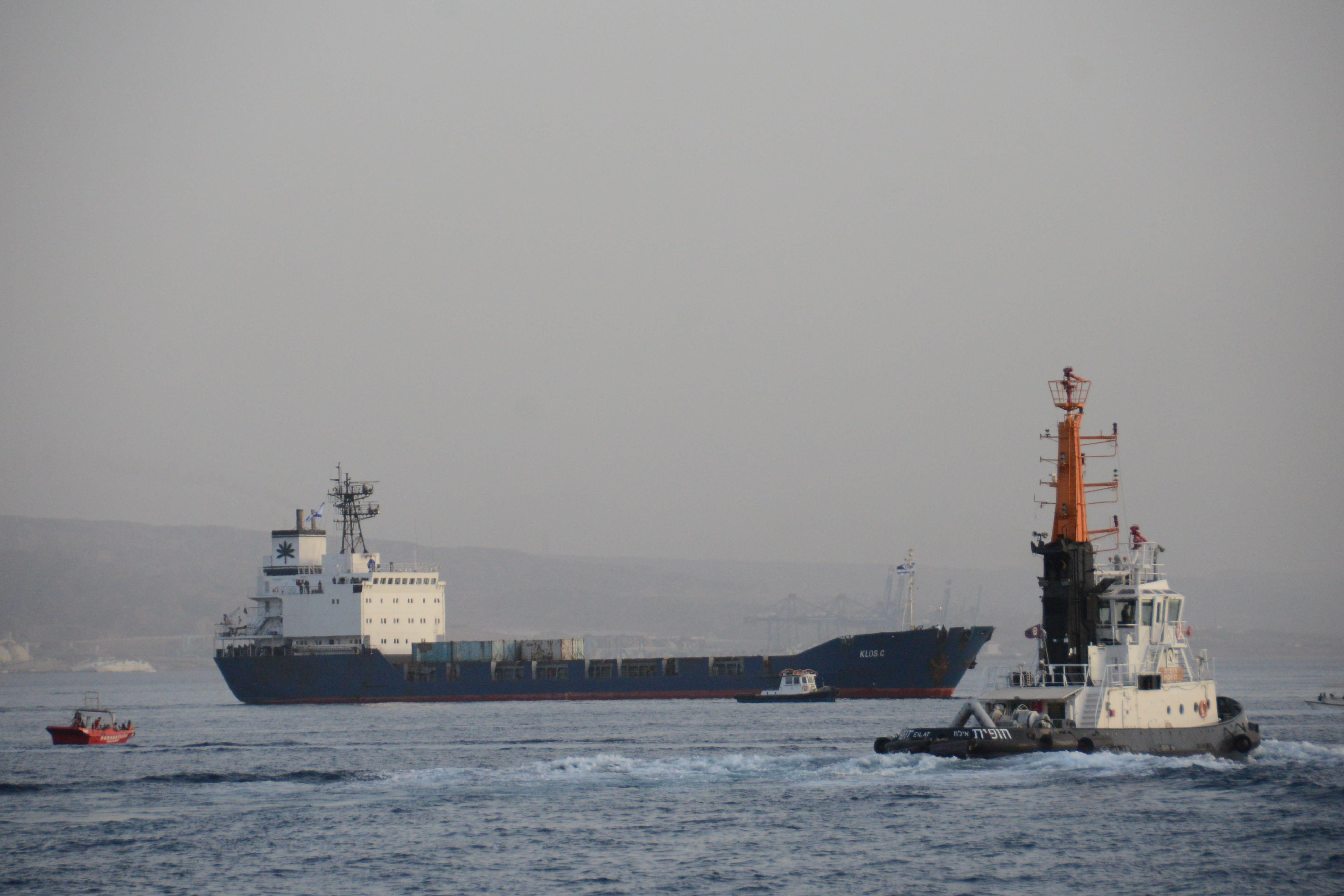 אוניית הנשק האיראנית "קלוס-סי" אשר נעצרה ע"י חיל הים בניסיונה להבריח טילים מדגם M-302 לארגוני טרור ברצועת עזה